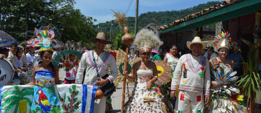 Desfiles organizados por los centros educativos de La Virtud.